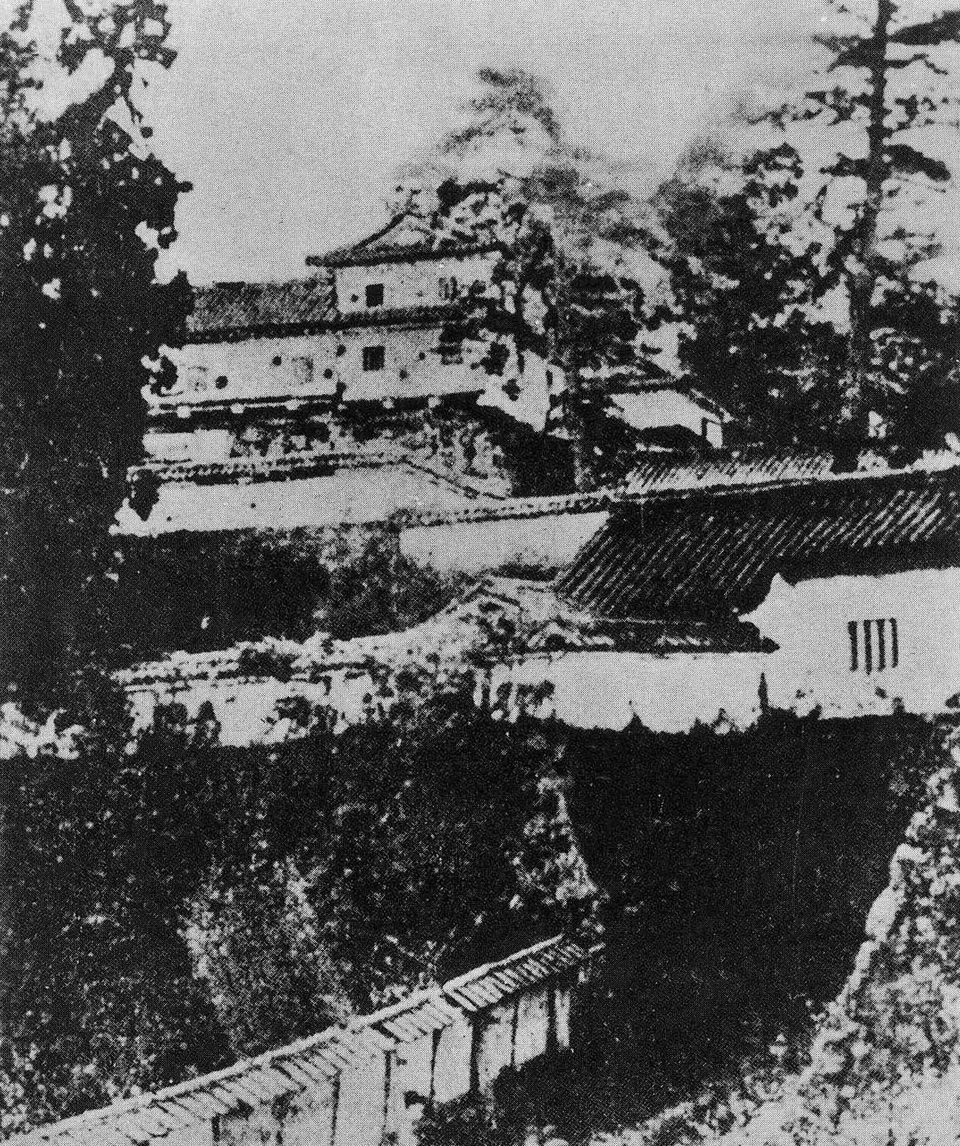 高取城二の丸、三の丸